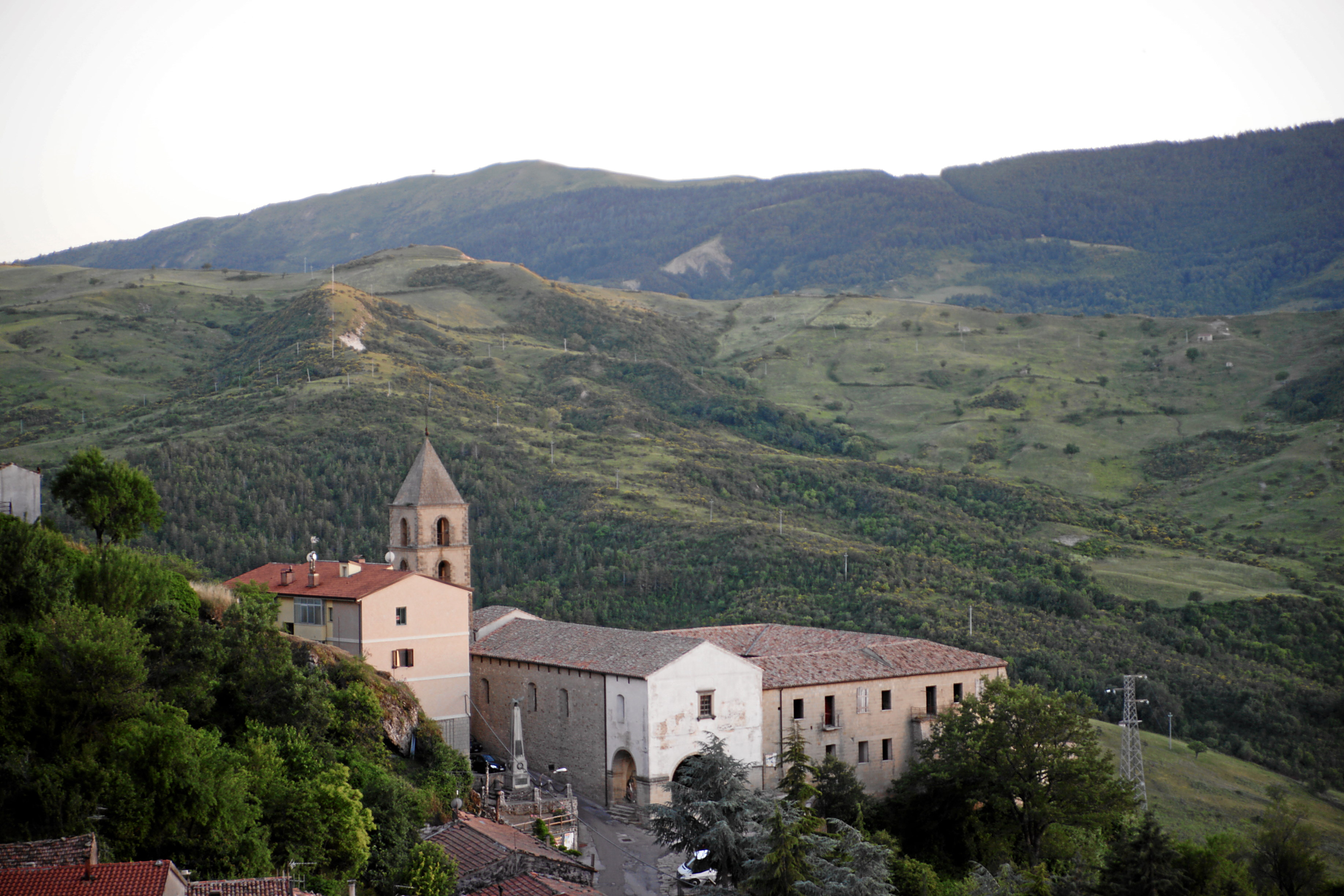 Pietrapertosa: Convento San Francesco